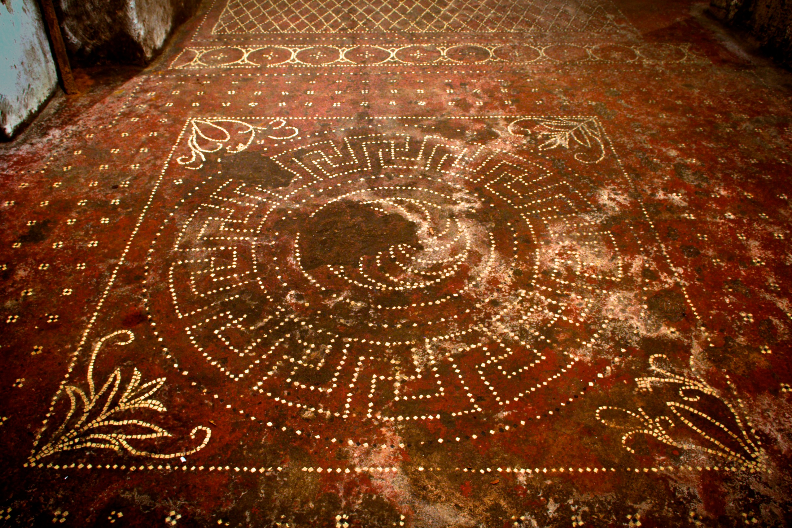 Domus Confuleius - Mosaico Sala 1 This is a photo of a monument which is part of cultural heritage of Italy.